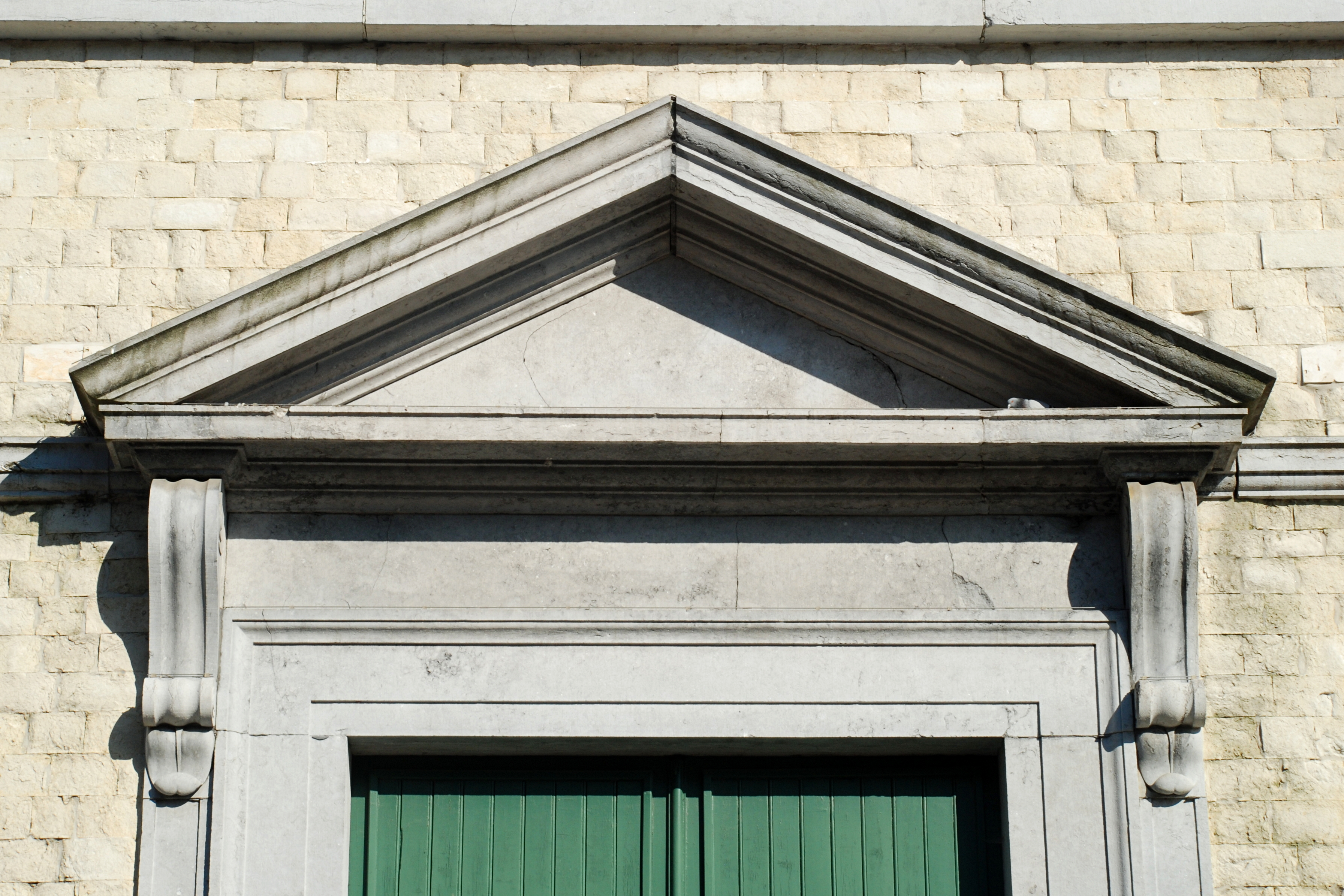 Belgique - Brabant wallon - Église Saint-Jean l'Évangéliste de Genappe